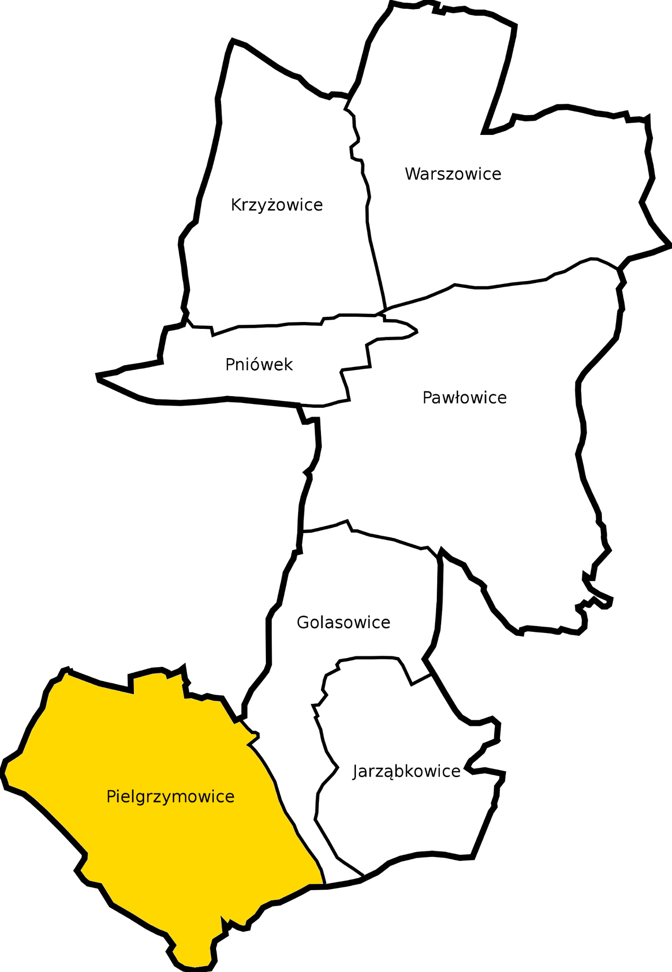 Sołectwo Pielgrzymowice na mapie gminy Pawłowice